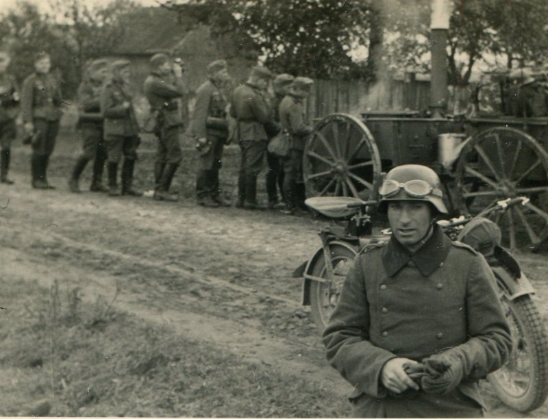 Feldküche (Gulaschkanone) der Wehrmacht zur Truppenversorgung während eines Einsatzes (1939 - 1945).